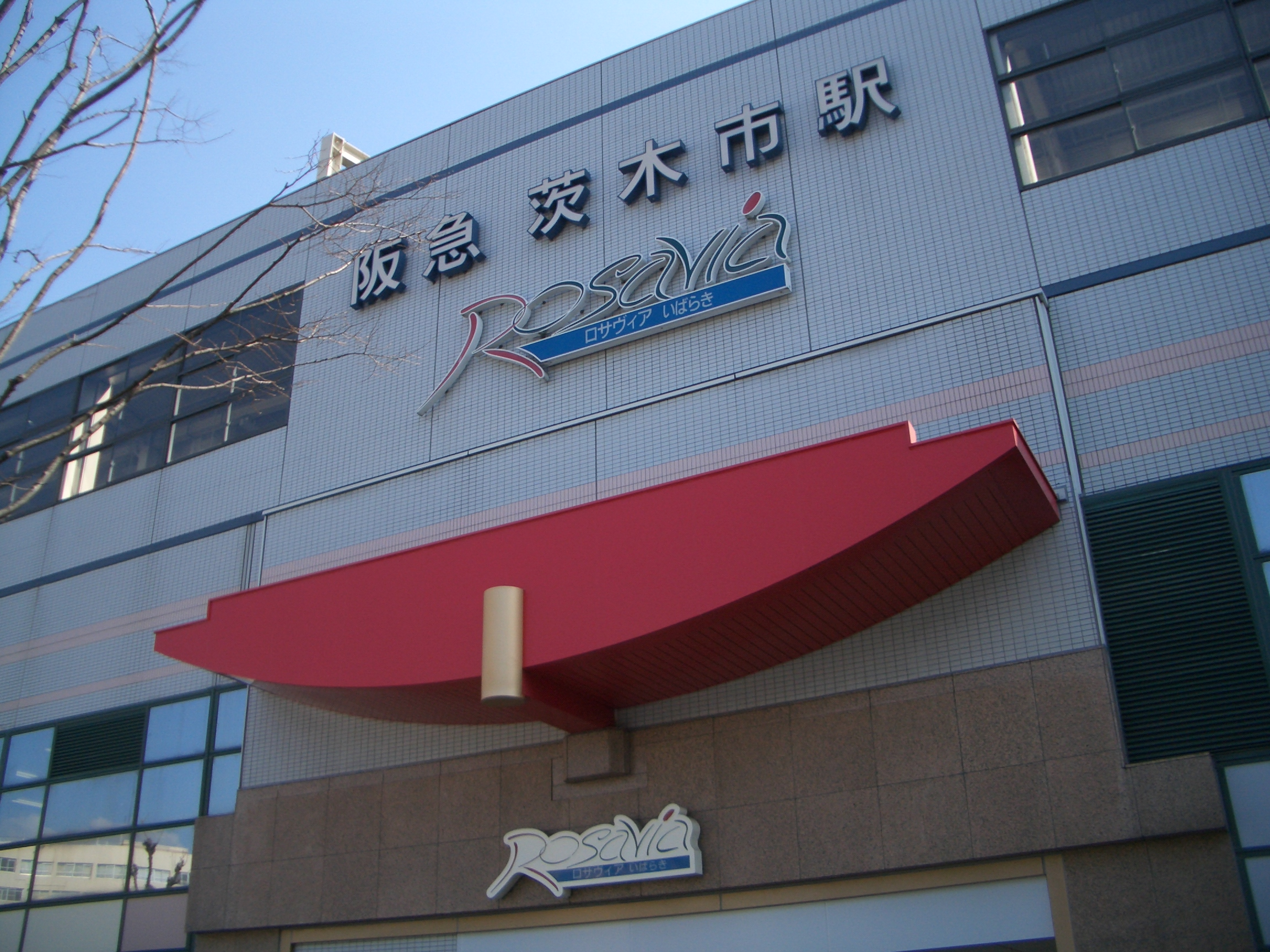 Rosavia,eidaicho Ibaraki-City Osaka Japan.